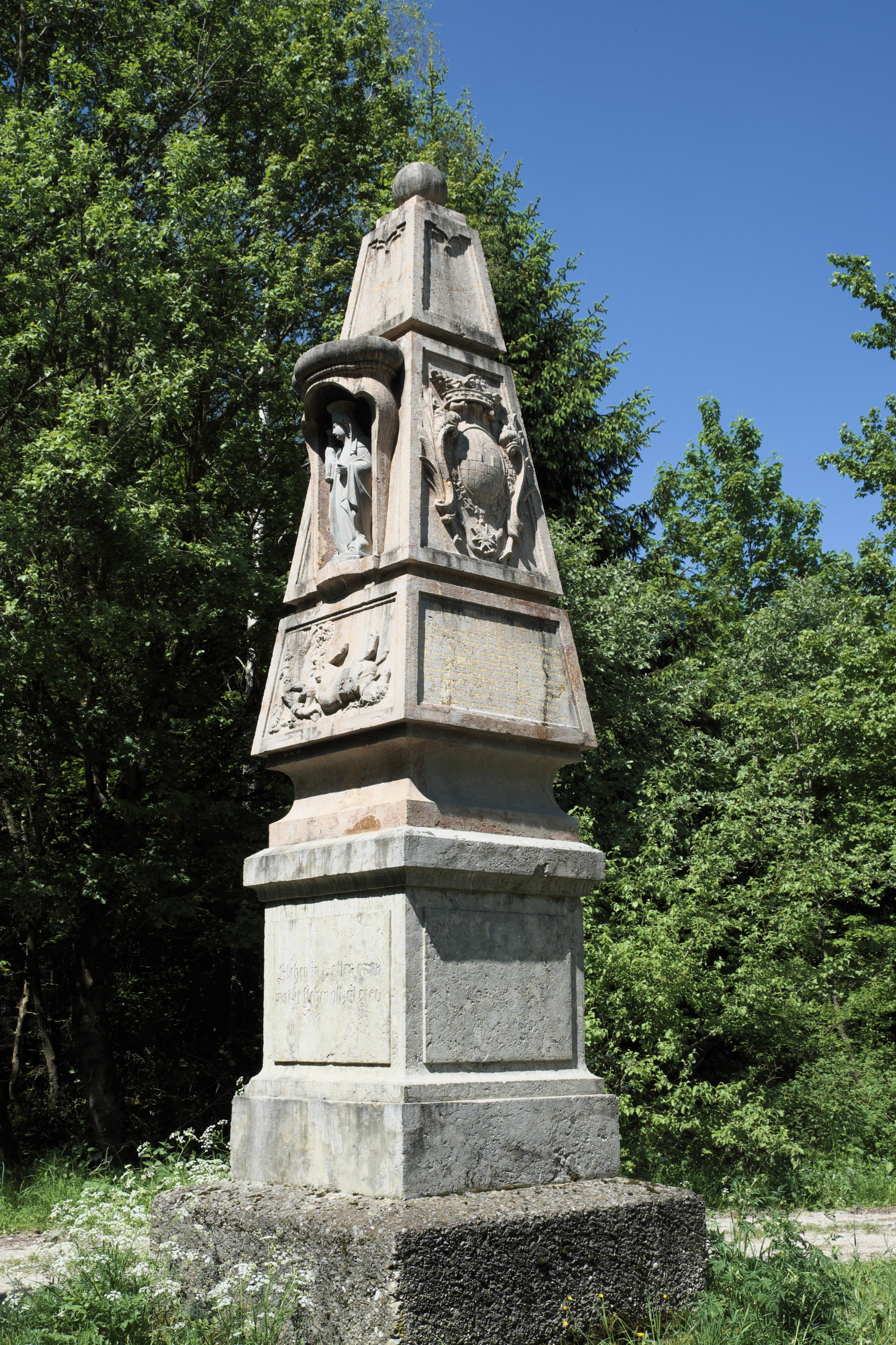 Preysingsäule im Forst Kasten in der Gemeinde Neuried (bei München) im Landkreis München (Bayern, Deutschland)